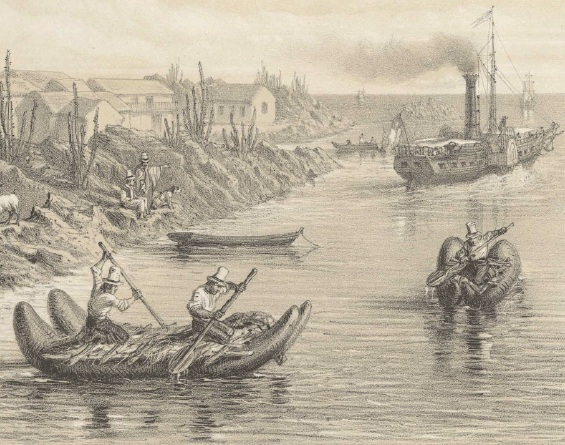 Puerto del Huasco (1840s or 1850s), Chile.